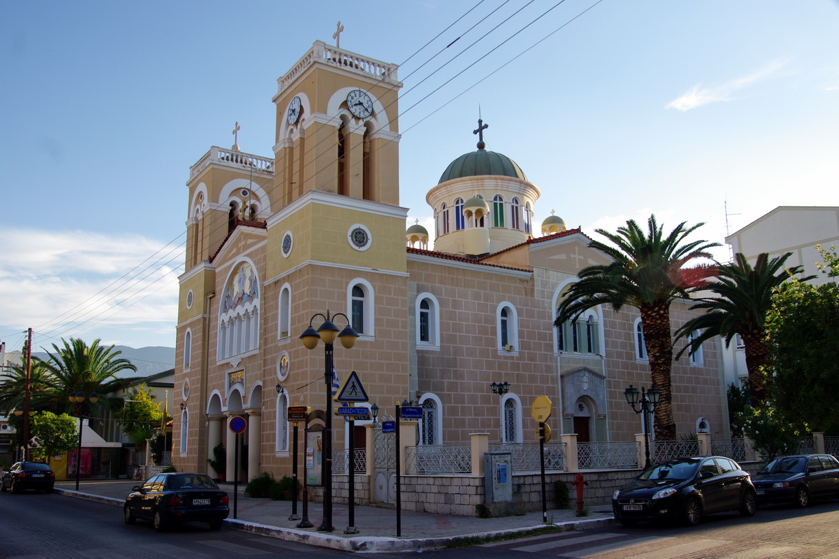 Verklärungskirche Itea, Provinz Fotida